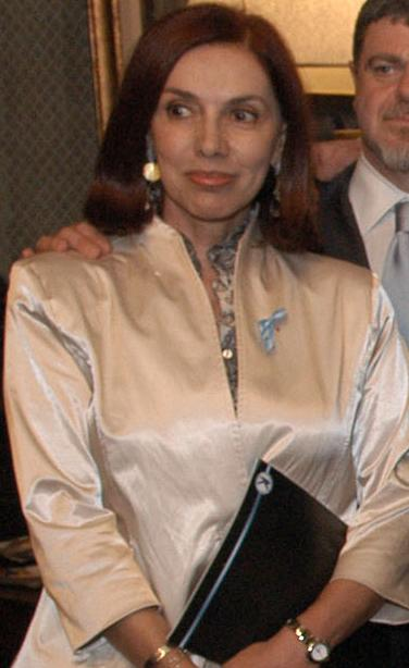 Detalle de Image:Artistas en casa rosada.jpg